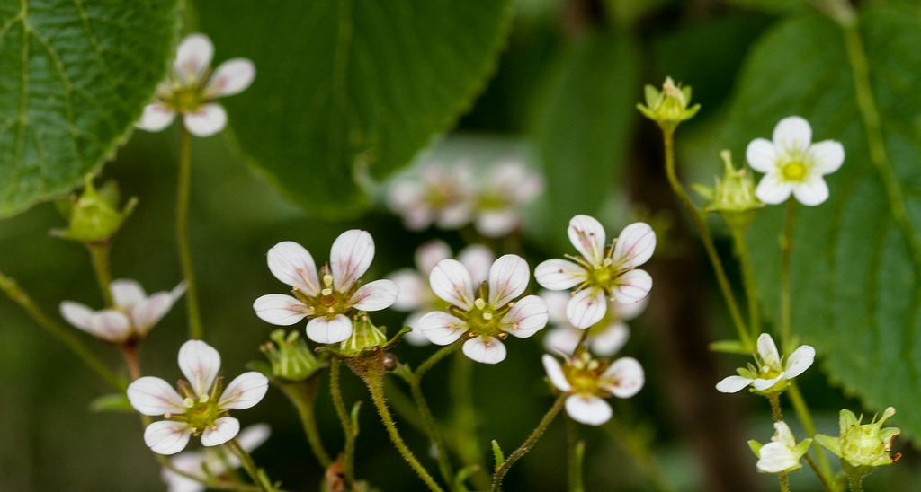 Alpengarten Villacher Alpe: Fünffingersteinbrech